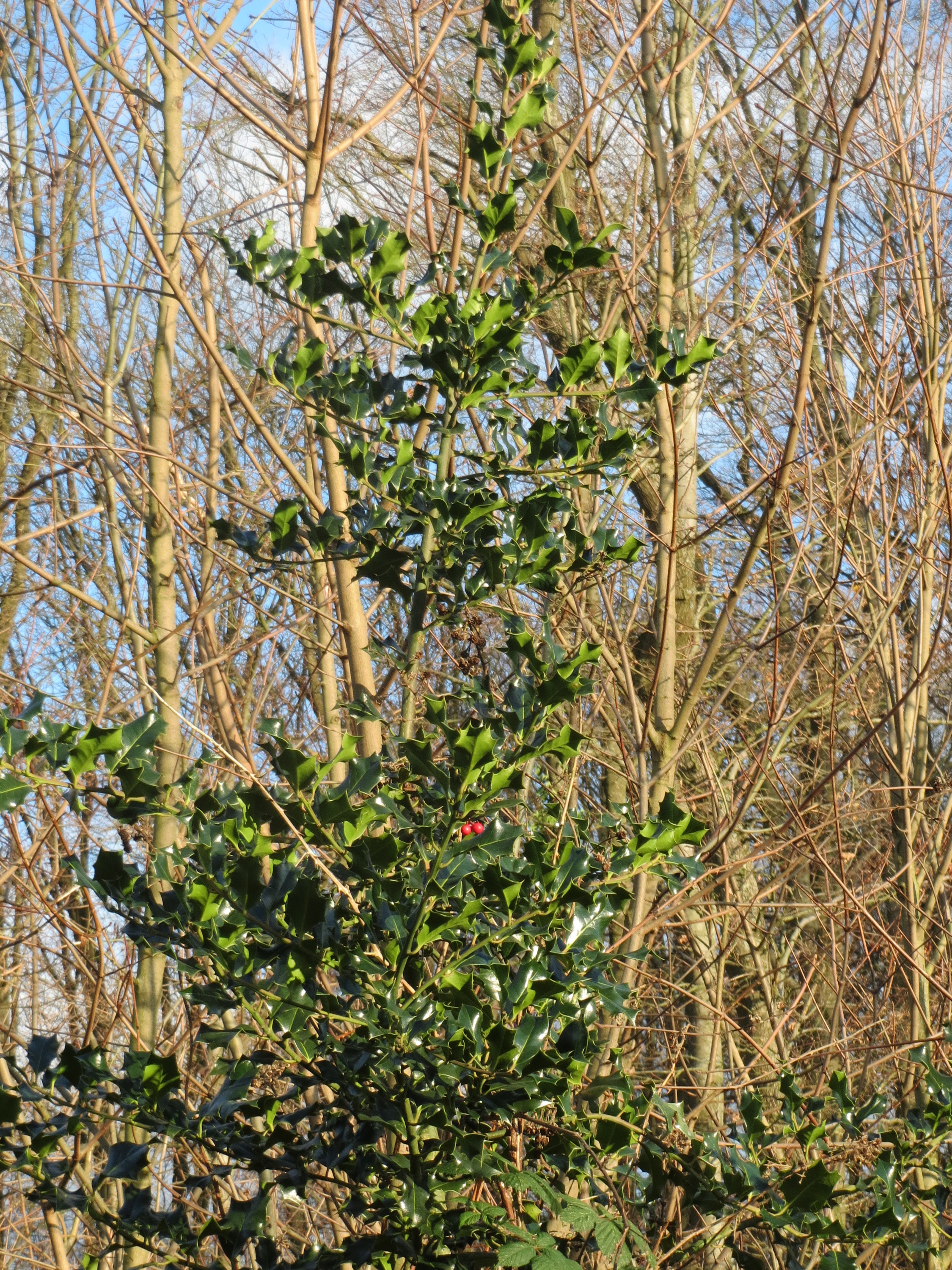 Europäische Stechpalme (Ilex aquifolium) am Winterberg in Saarbrücken